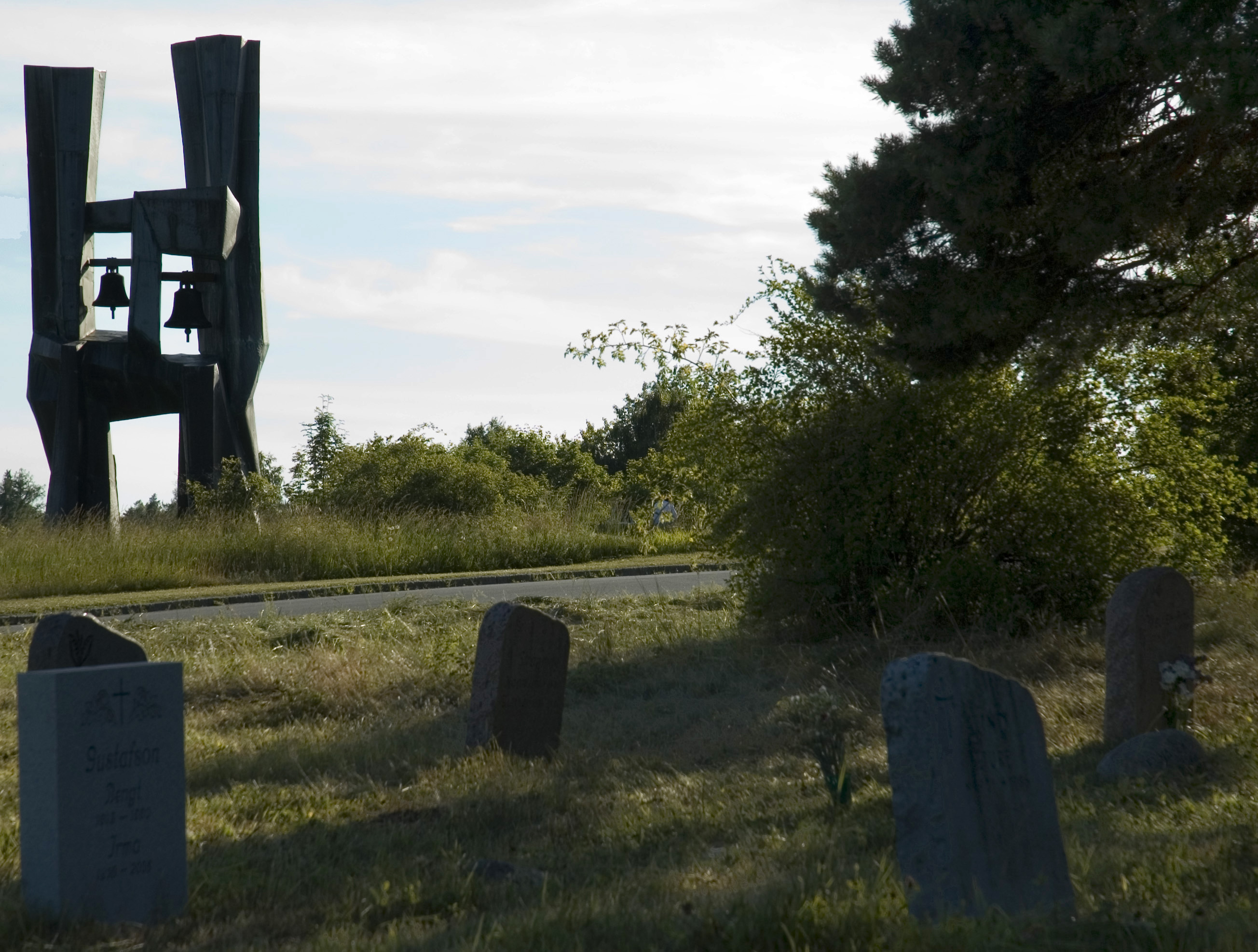 Berthåga kyrkogård, Uppsala juli 2010. Klockstapeln är ritad av konstnären Olof Hellström